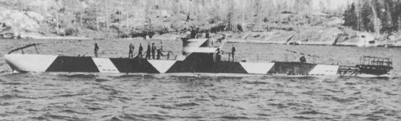 Submarine Vesikko